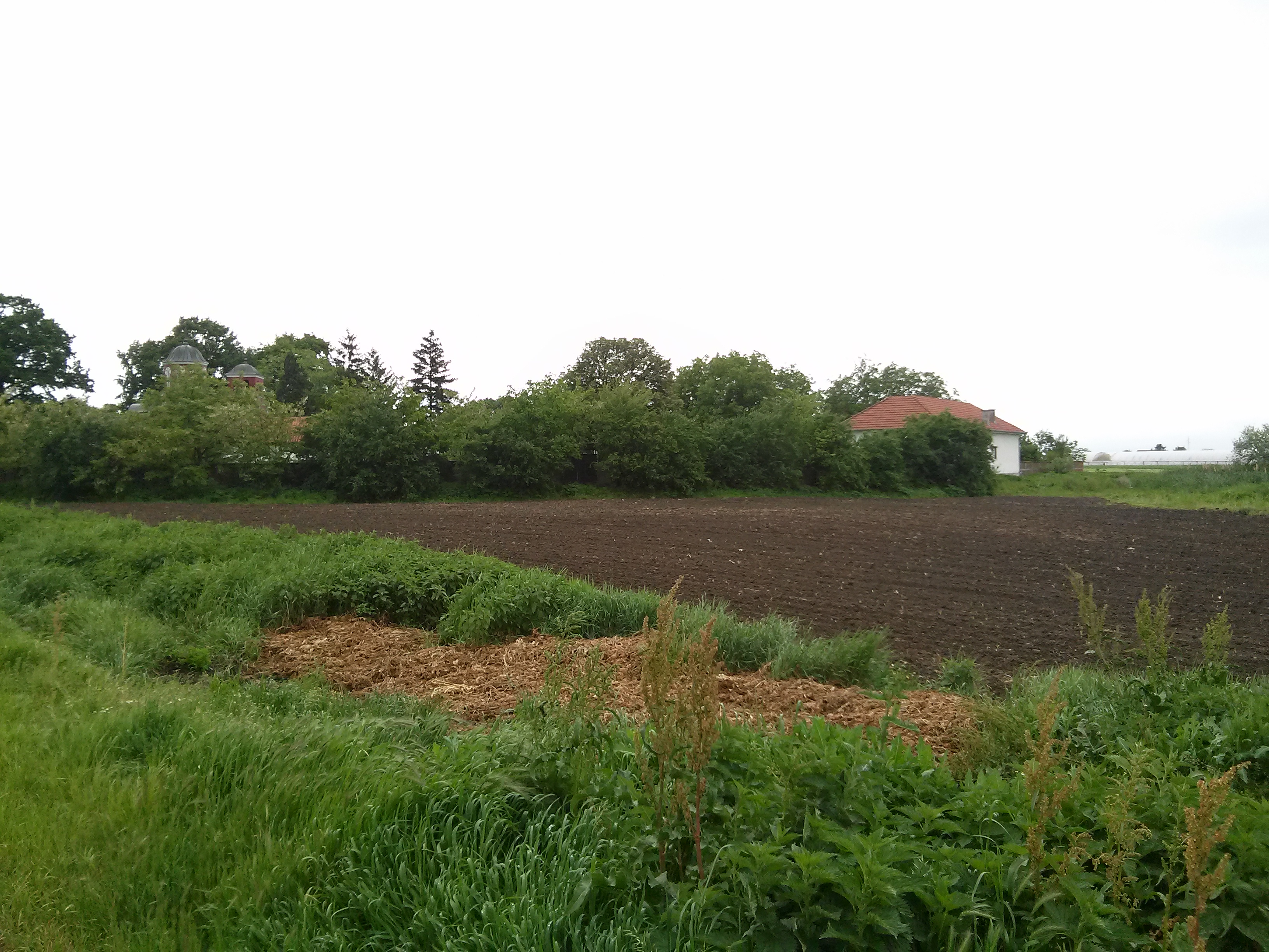 Srpski (latinica): Prostor iza Kumarevske crkve, mesto na kome je nekada bilo močvarno područje sa izvorom lekovite vode, danas obradive povšrine